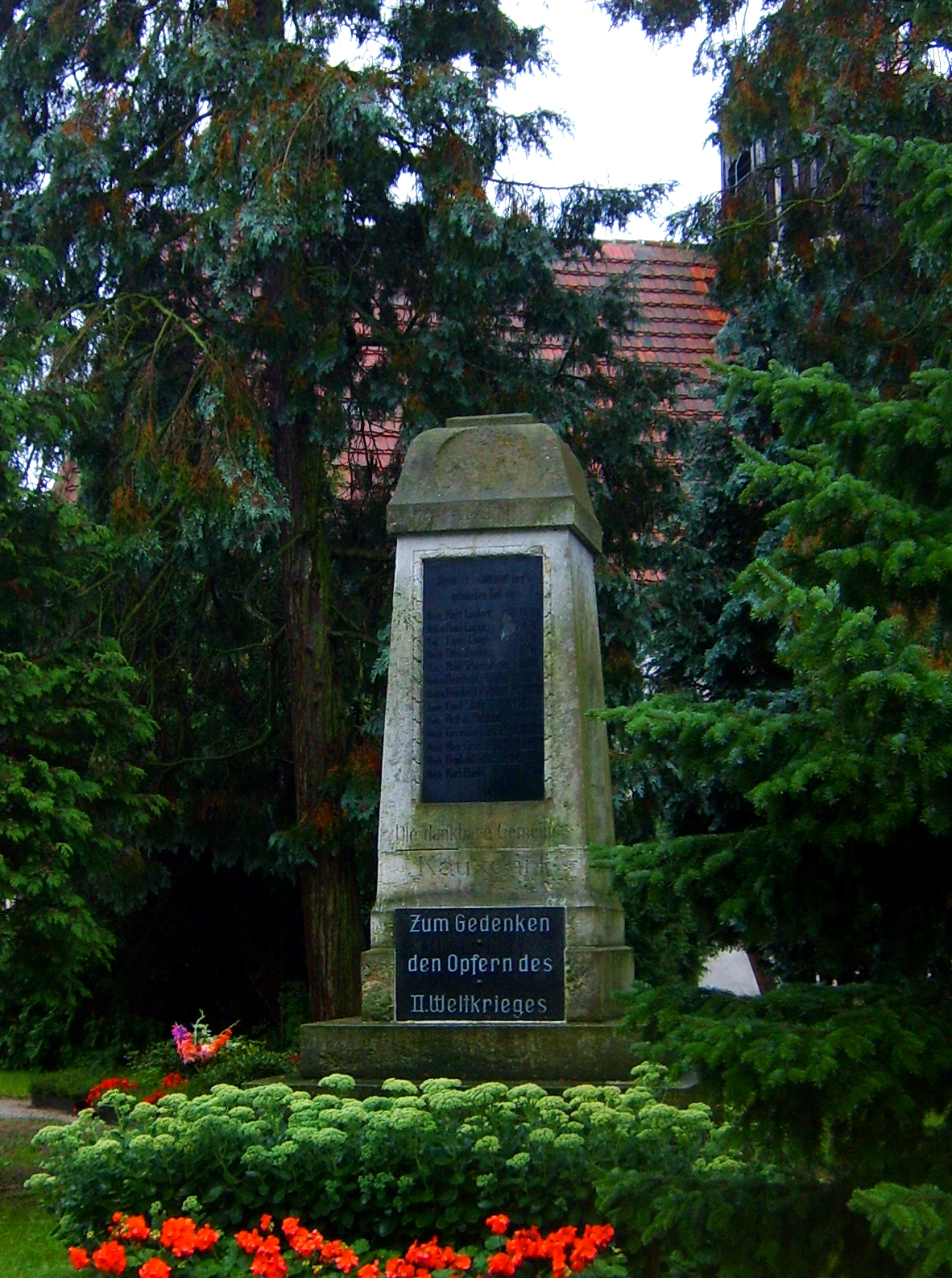 Kriegerdenkmal in Kauxdorf.